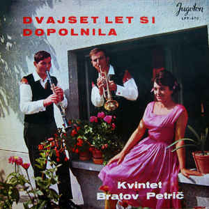 Ansambel Vilija Petriča - Dvajset let si dopolnila.